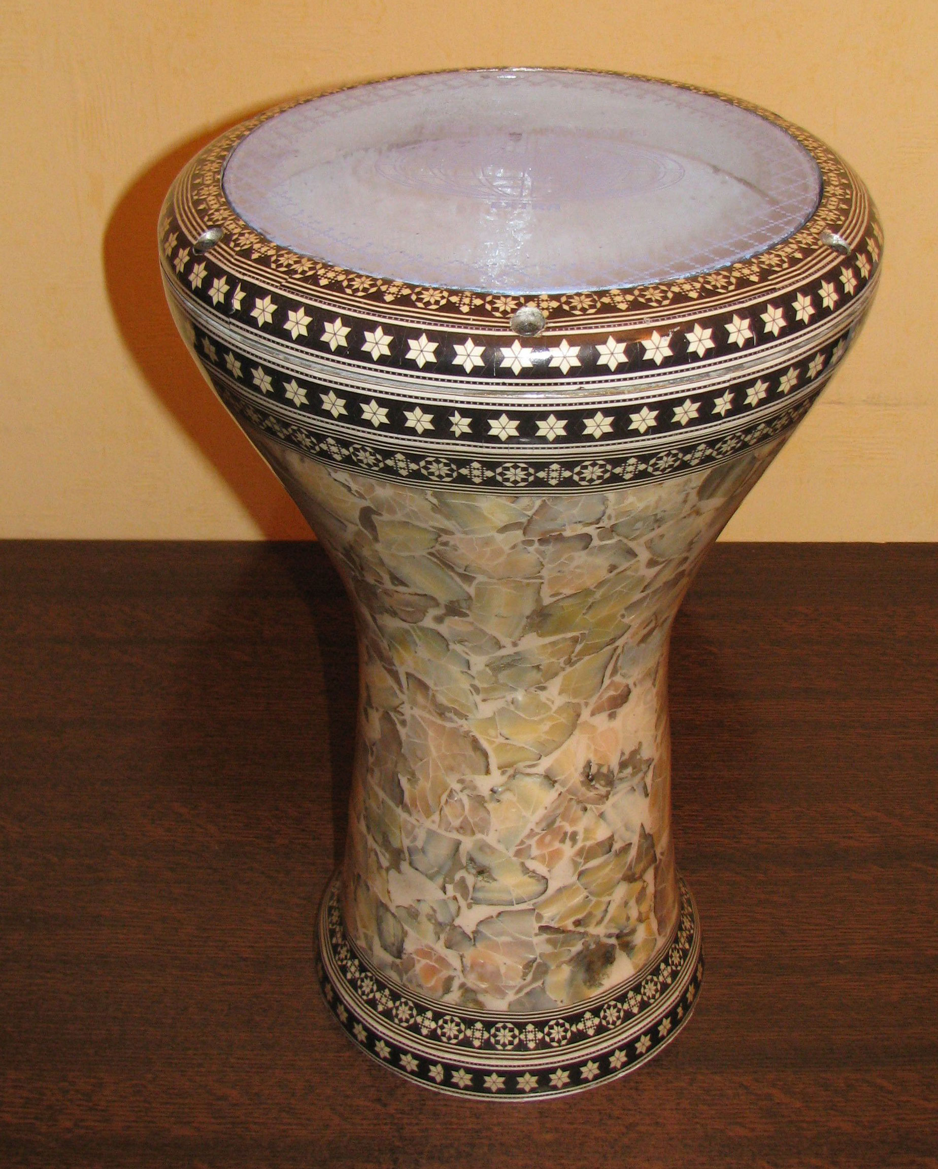 Darbouka égyptienne (tabla)